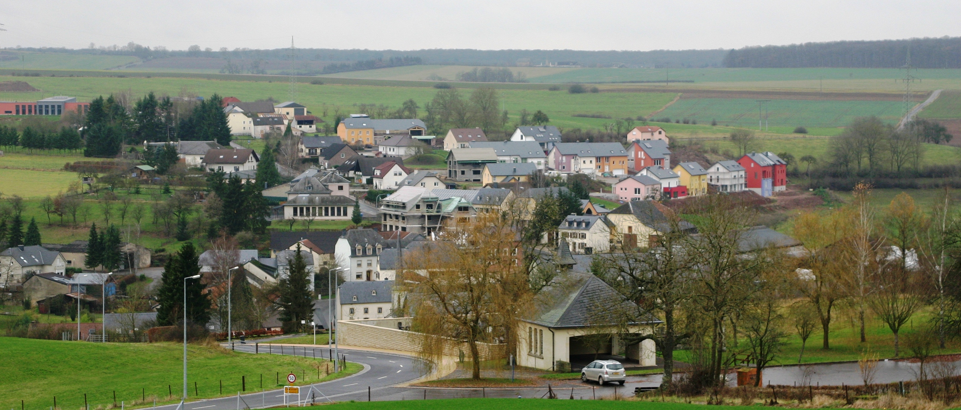 Iermsdref vun uewe gesinn